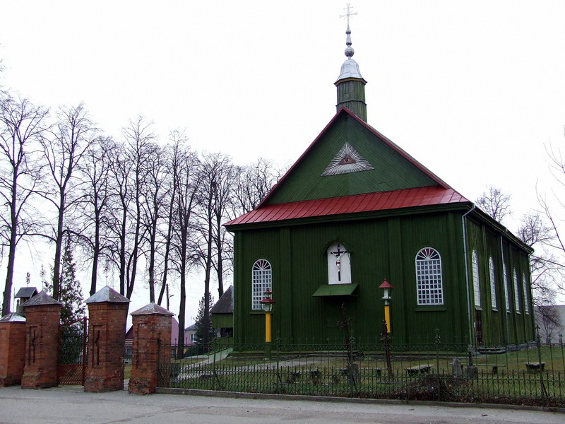 Šv. apaštalų Petro ir Povilo church, Babtai, Lithuania.